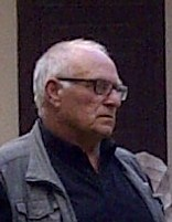 Djémal Djoti Bjalava, sculpteur géorgien